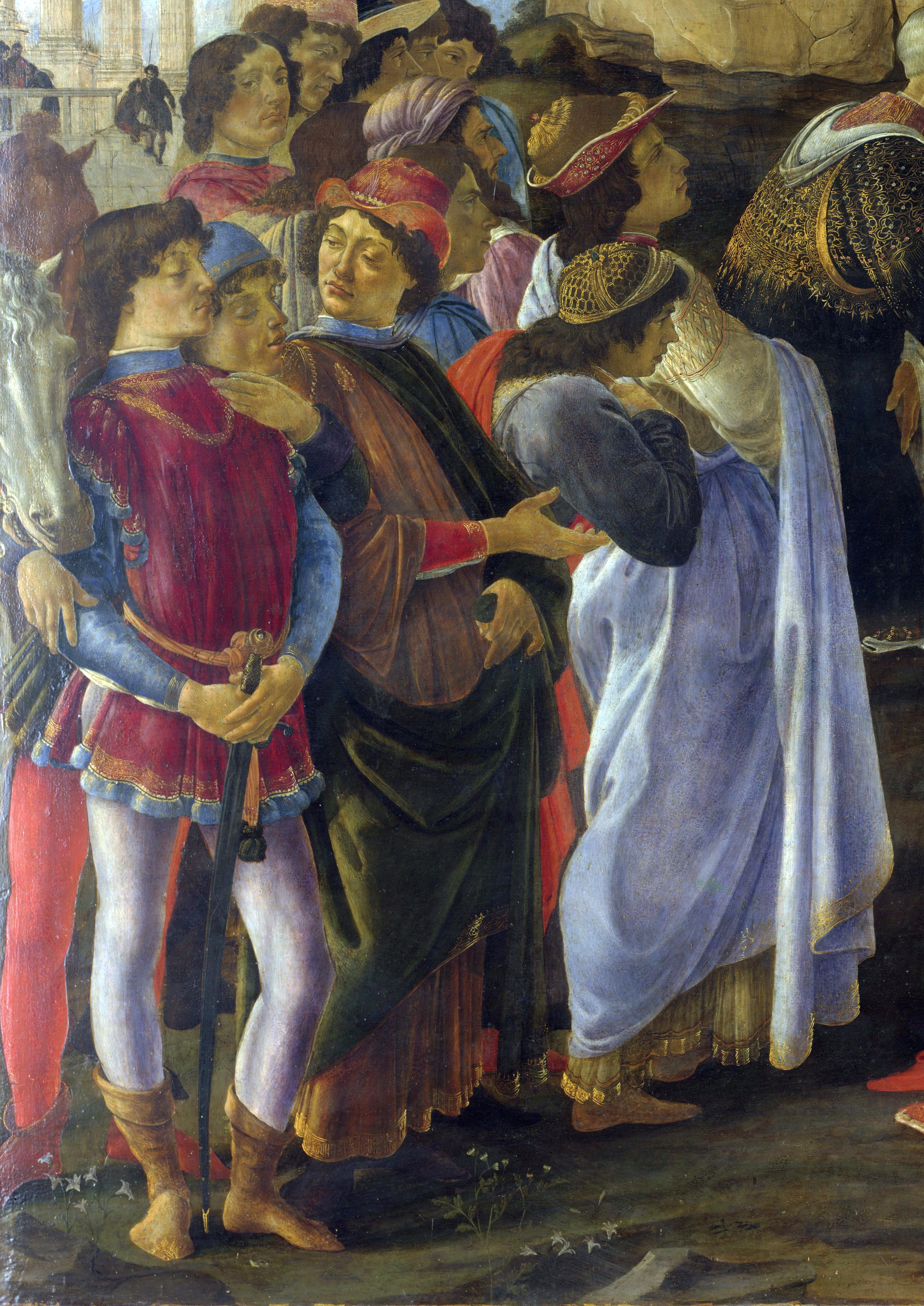 Zanobi-Altar, mit Darstellung der Mitglieder der Medici-Familie als Könige: Cosimo (kniend), Piero und Giovanni (Rückenfiguren im Mittelpunkt) und Angehörige des Medici-Hofes